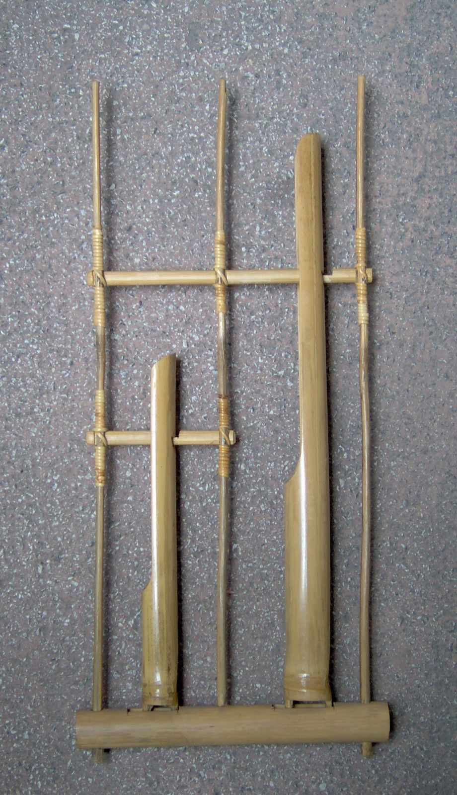 indonesian angklung